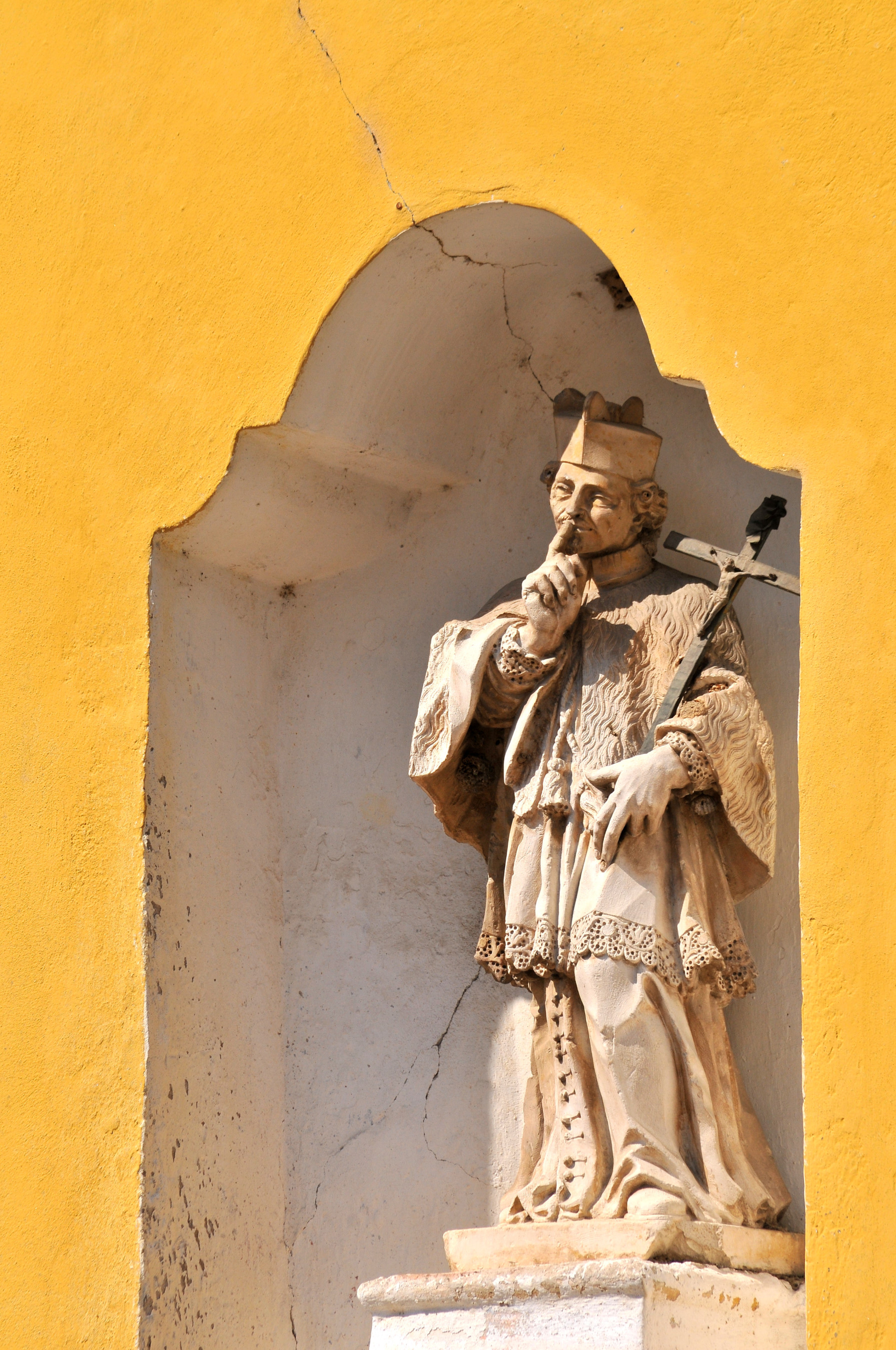 Chiesa di San Giovanni Nepomuceno - Ala (TN) - (particolare) This is a photo of a monument which is part of cultural heritage of Italy.